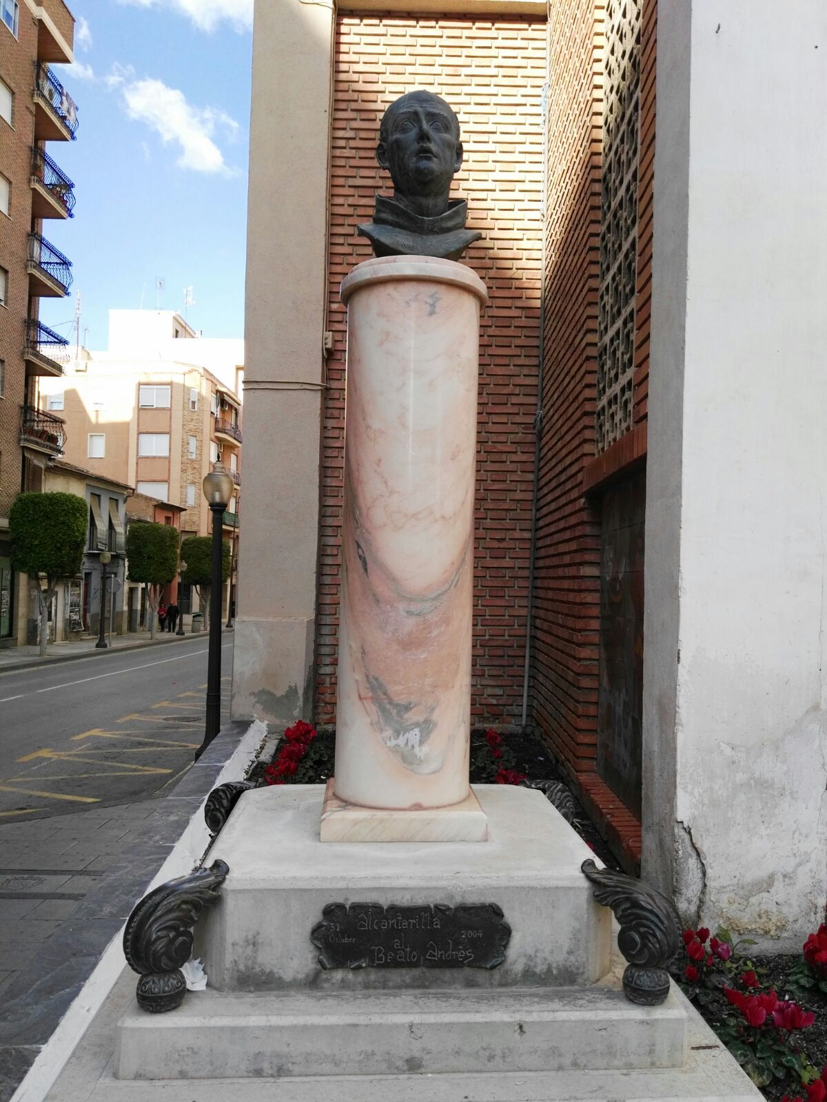 Beato Andres